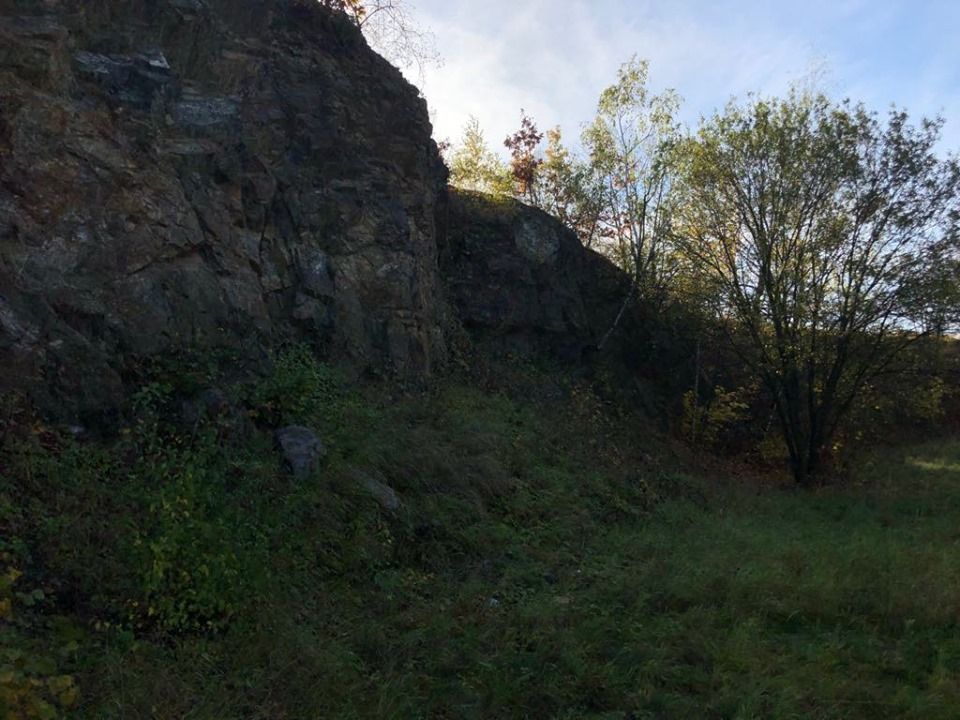 Fotografie PP Kněživka